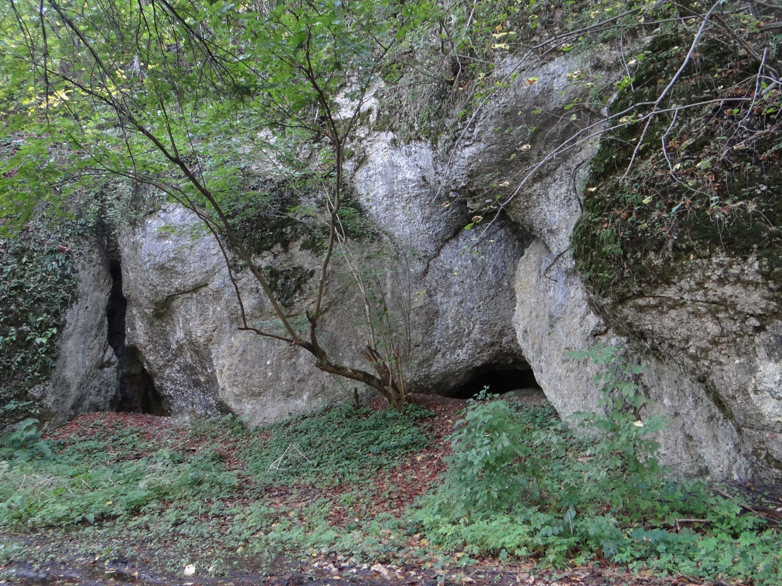 Gaudynowska Baszta w Dolinie Brodłówki